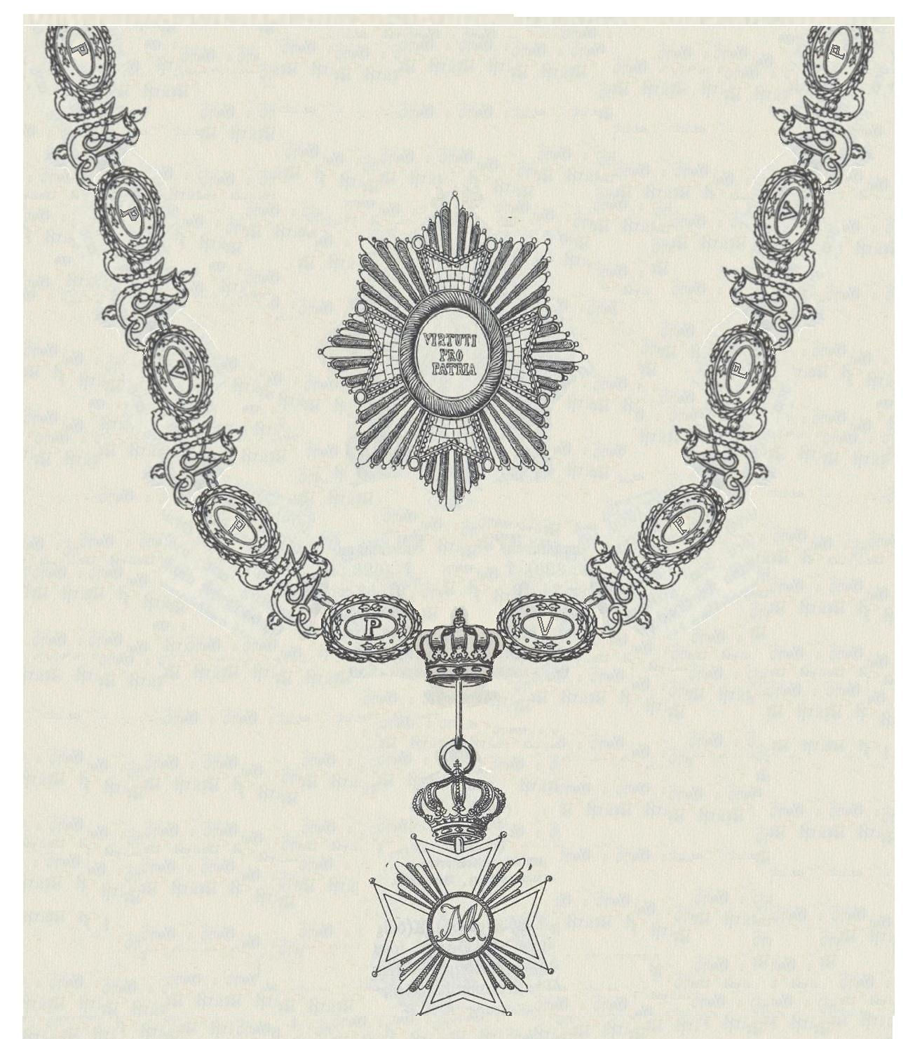 Max-Joseph-Militärorden, Kette oder Collane und Stern